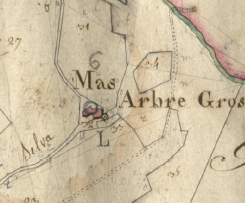 L'Arbre Gr0s, de les Illes, en el Cadastre napoleònic del 1812 (Arxius Departamentals dels Pirineus Orientals)